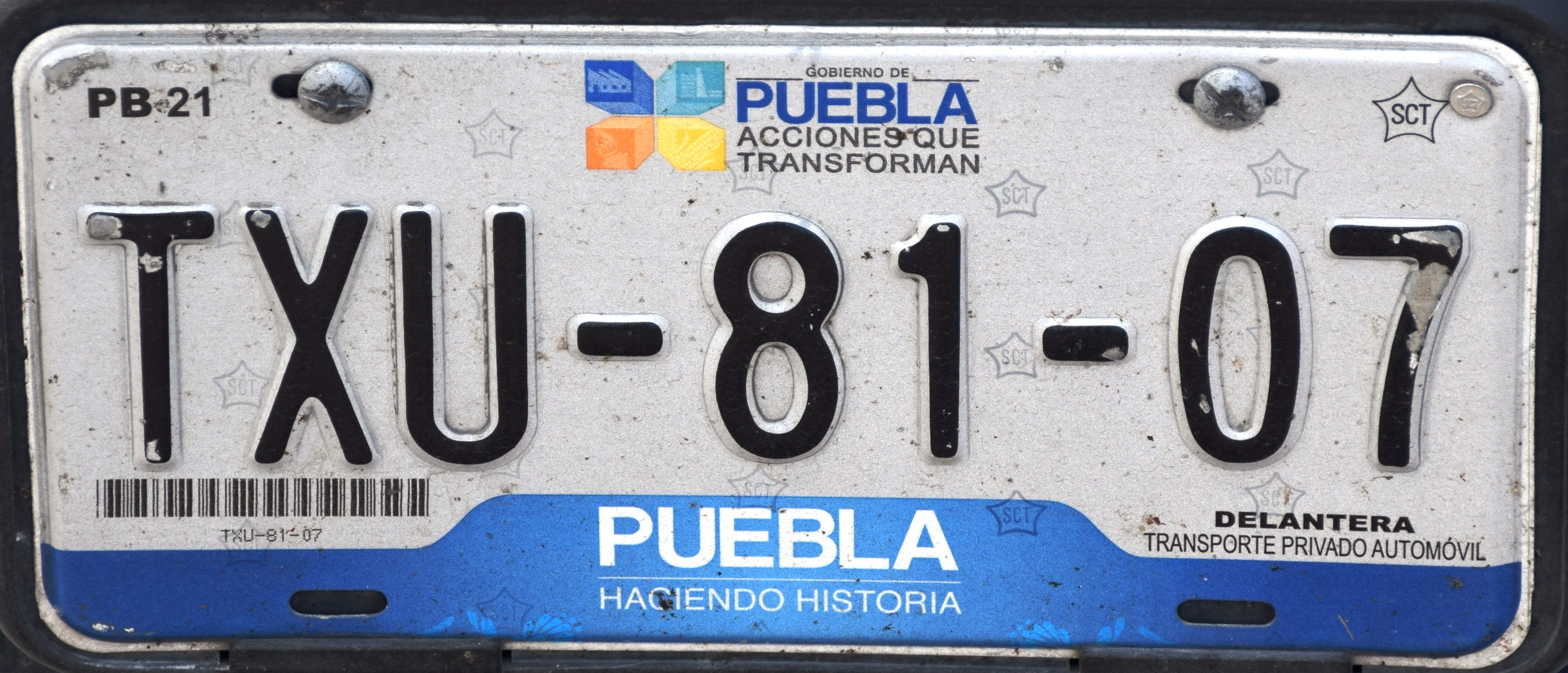 Kentekenplaat uit Mexico